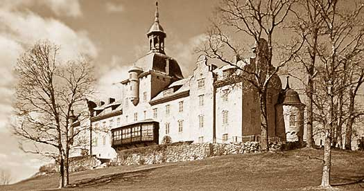 Kobergs slott